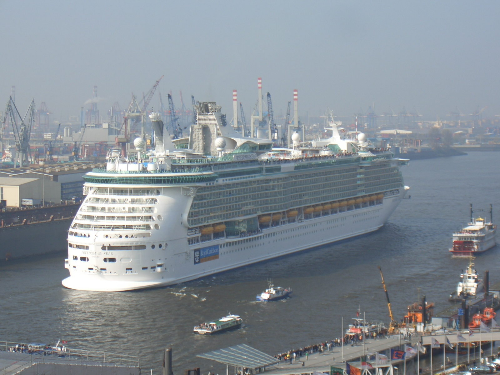 Die Freedom of the Seas verläßt den Hamburger Hafen. Foto: Seebeer